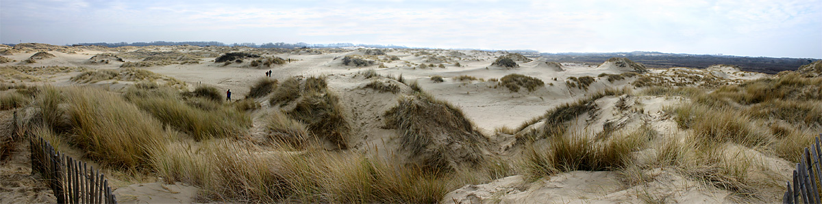 Panorama De Panne Dunes, Belgium. Author: Elke Wetzig (elya) Date: 2005-02-06